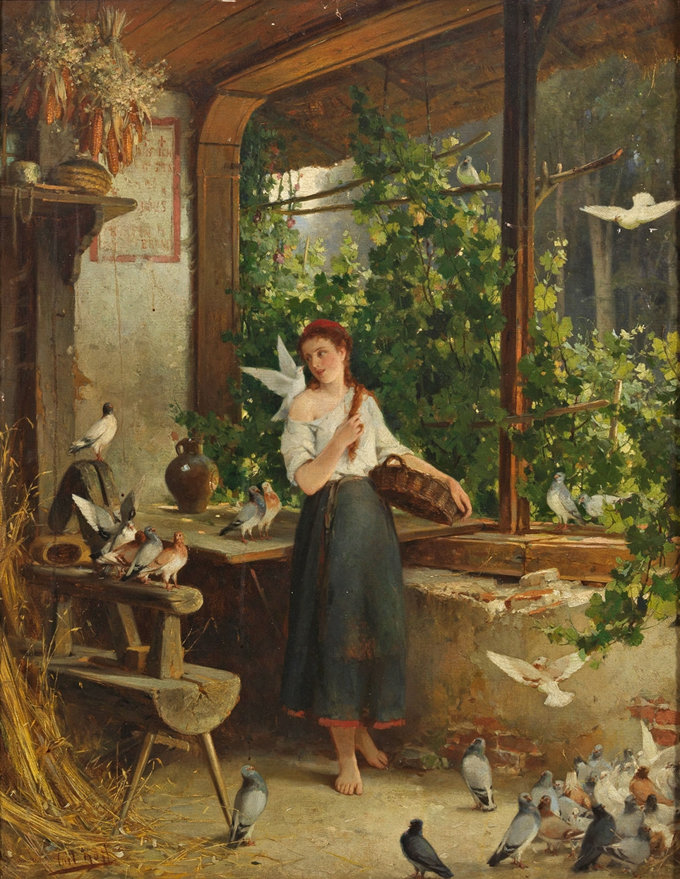 "Aschenbrödel"